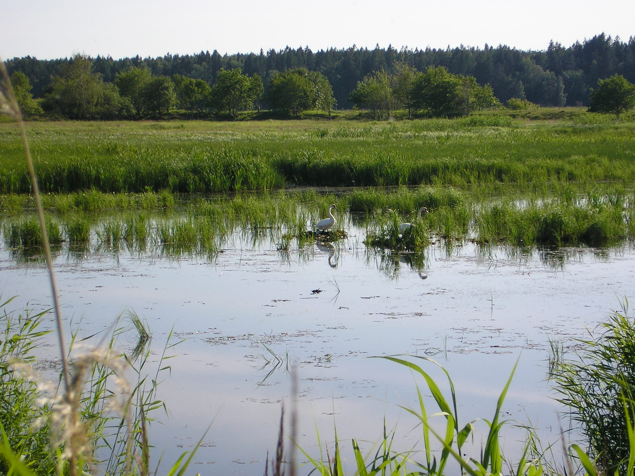 Svanar i Nygårdsängens naturreservat i Vänersborg.